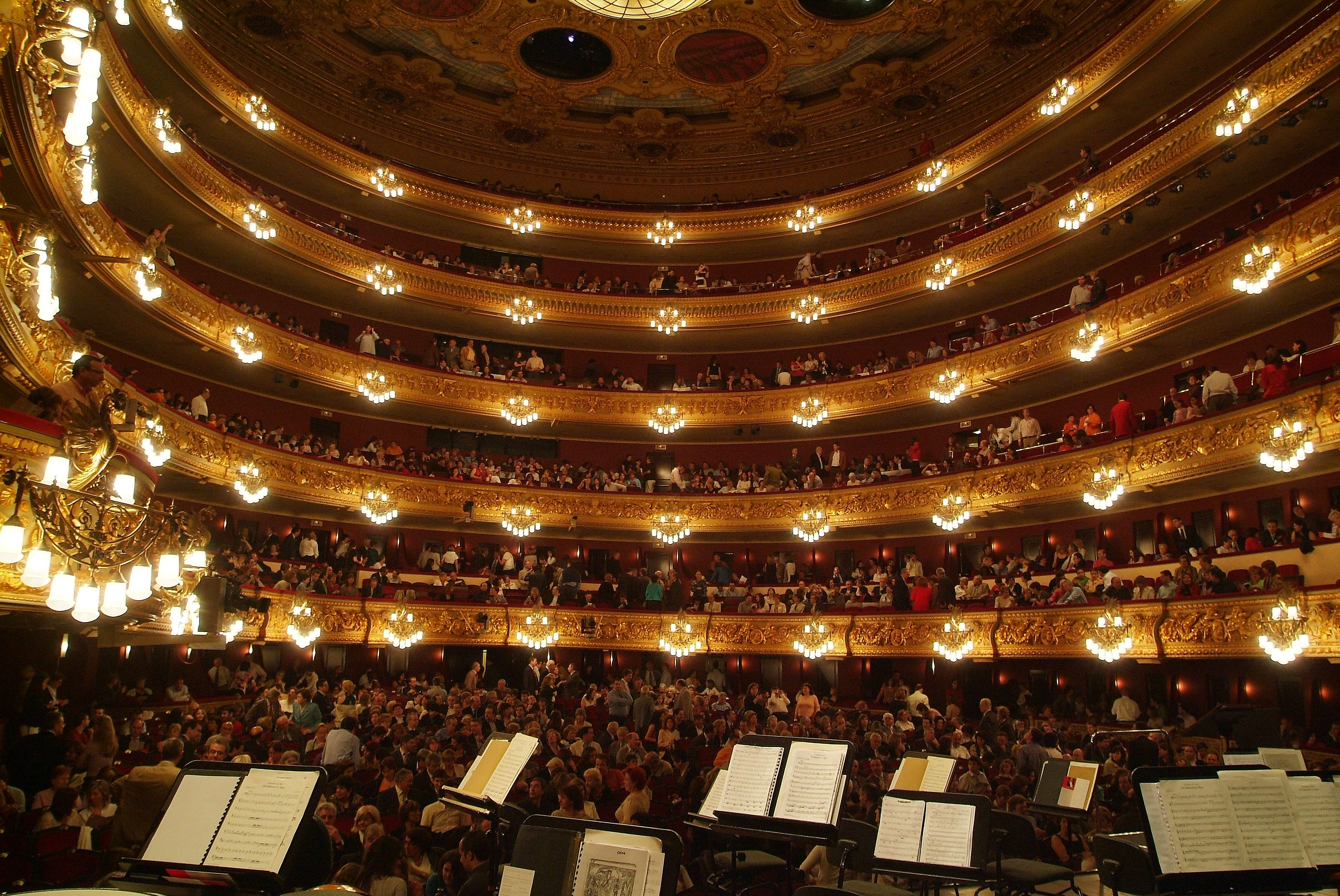 Liceu - Interior